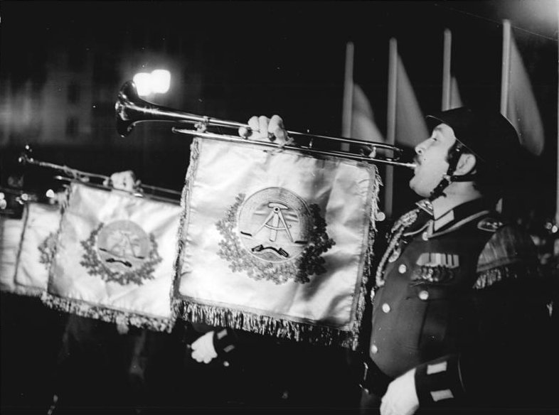 Berlin, 23. Jahrestag DDR-Gründung, Zapfenstreich ADN-ZB Kluge 6.10.1972 Berlin: Ein Großer Zapfenstreich der NVA Am Vorabend des 23. Jahrestages der DDR fand in der Karl-Marx-Allee das traditionelle Zeremoniell des Großen Zapfenstreiches der NVA statt.